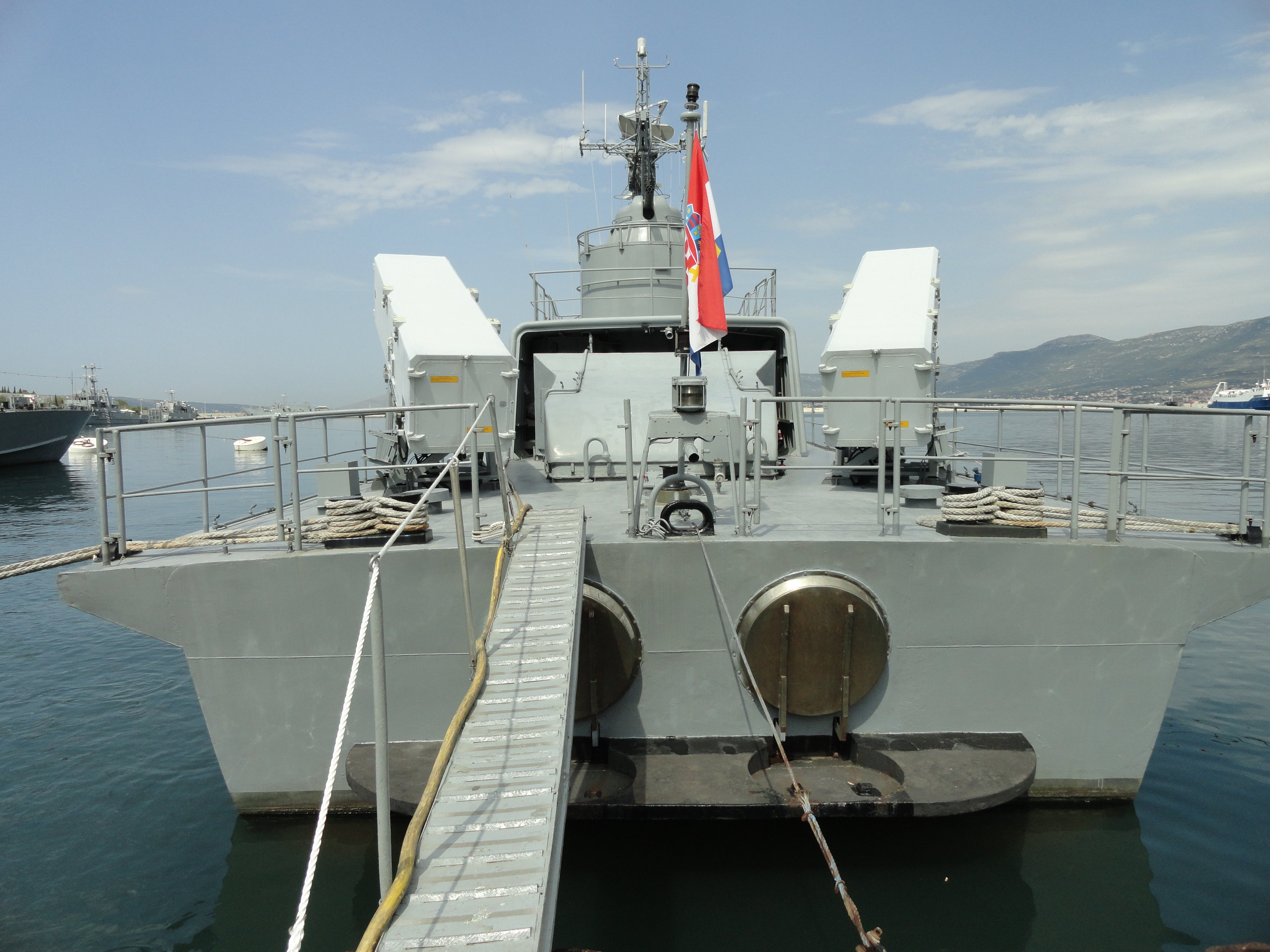 Krma RTOP-21 Šibenik.